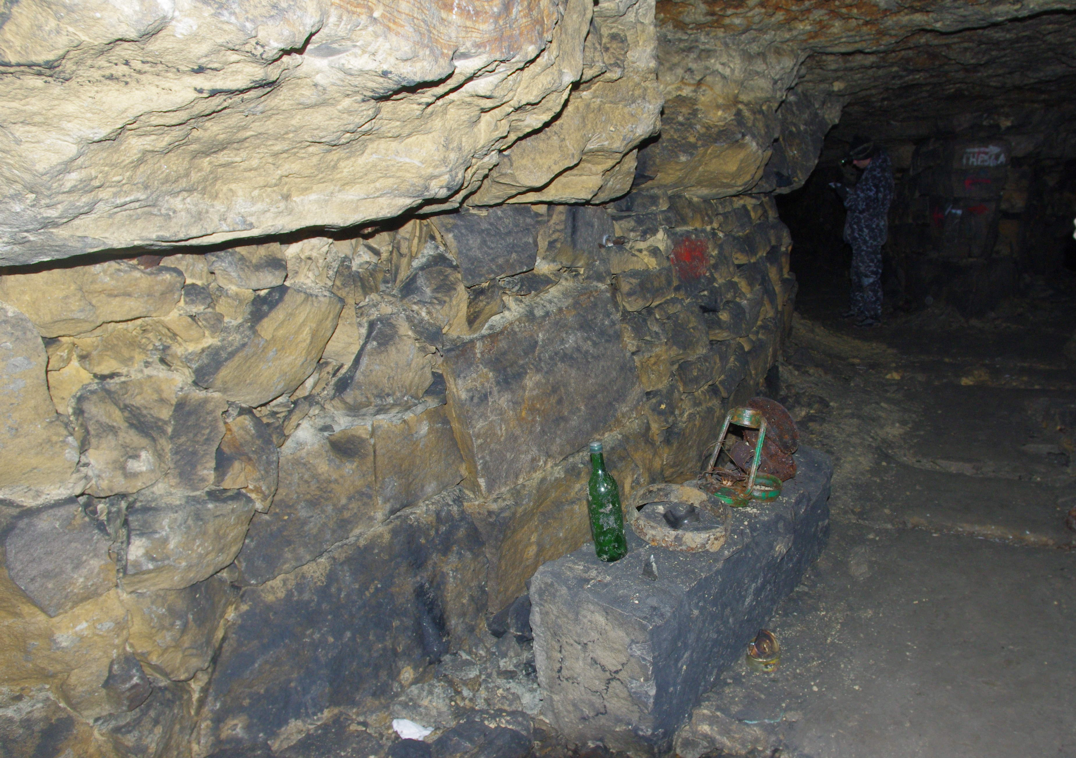 Москва, Девятовские каменоломни (Силикаты)